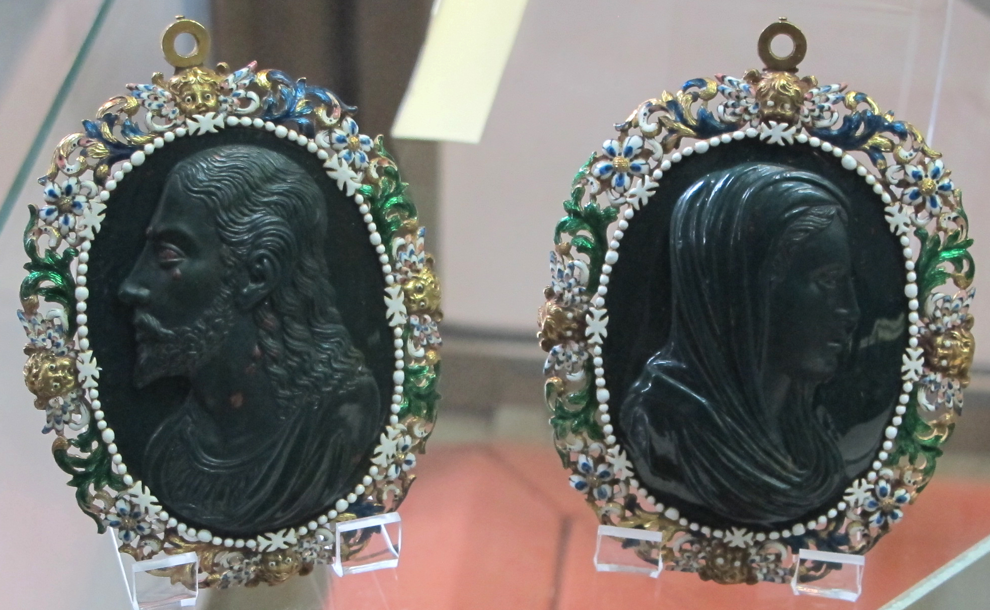 Italia (firenze), santa vergine e gesù cristo, eliotropio, 1560 ca